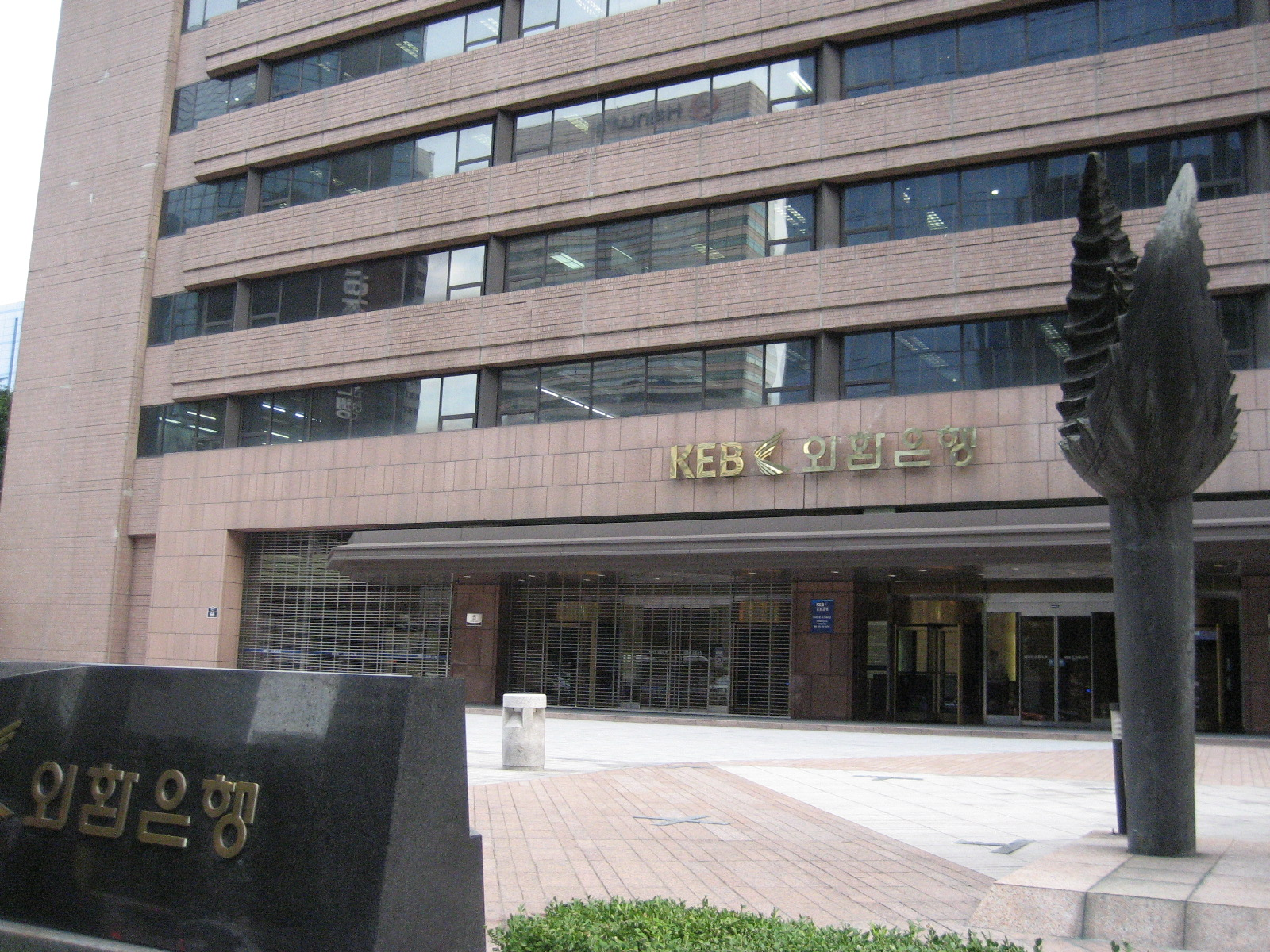 韓国外換銀行 本店 (Seoul)